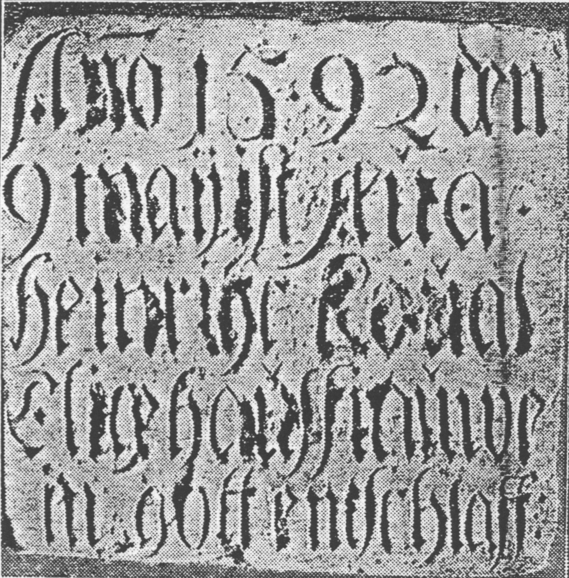 Fotografie eines Ziegeltongrabsteins aus dem 16. Jahrhundert an der Sankt-Stephanus-Kirche in Magdeburg Westerhüsen